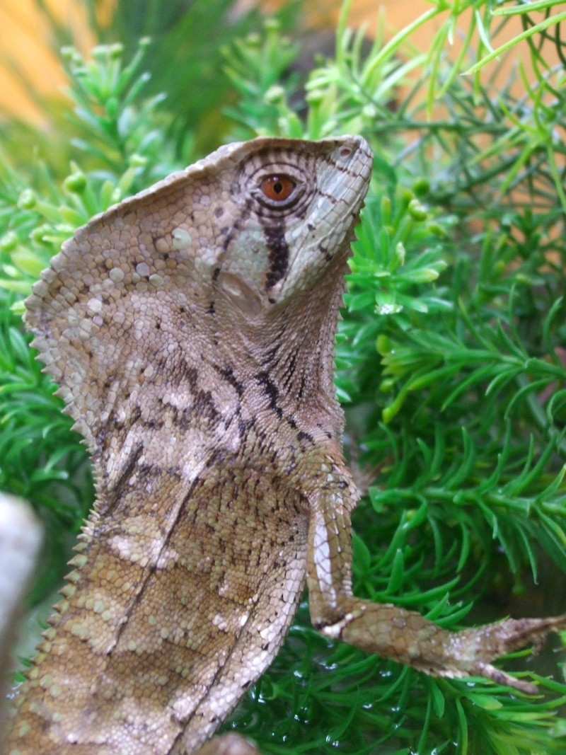 Corytophanes cristatus (reptil neotropical que recibe diversos nombres: Turipache cabeza lisa, cutete de montaña, cutete de hacienda, perrozompopo).